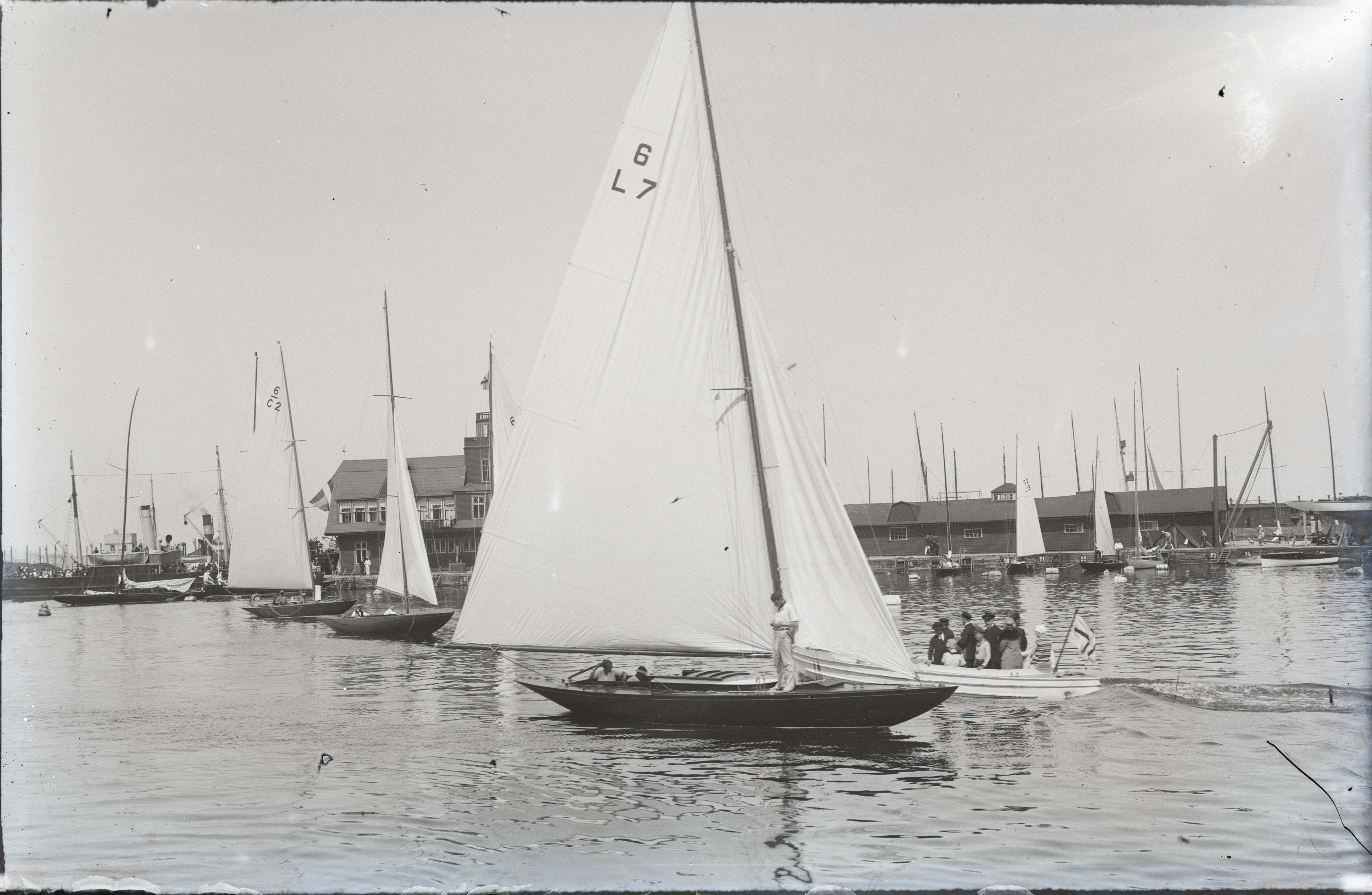 Jahid merel, tagaplaanil Eestimaa Jahtklubi hoone